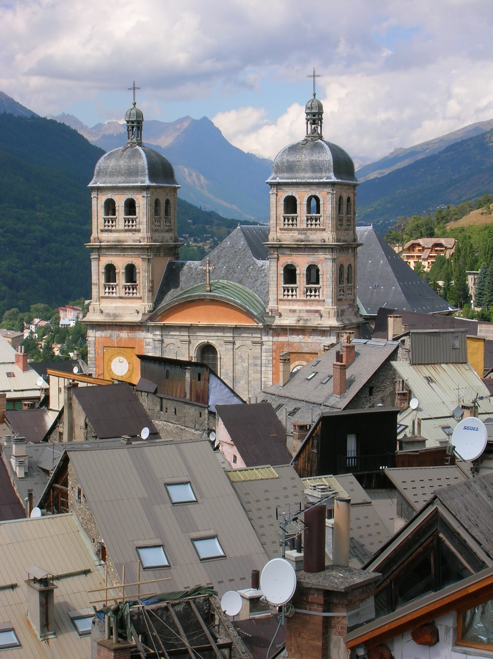 Vue de l'église Notre-Dame-et-Saint-Nicolas ancienne collégiale de Briançon